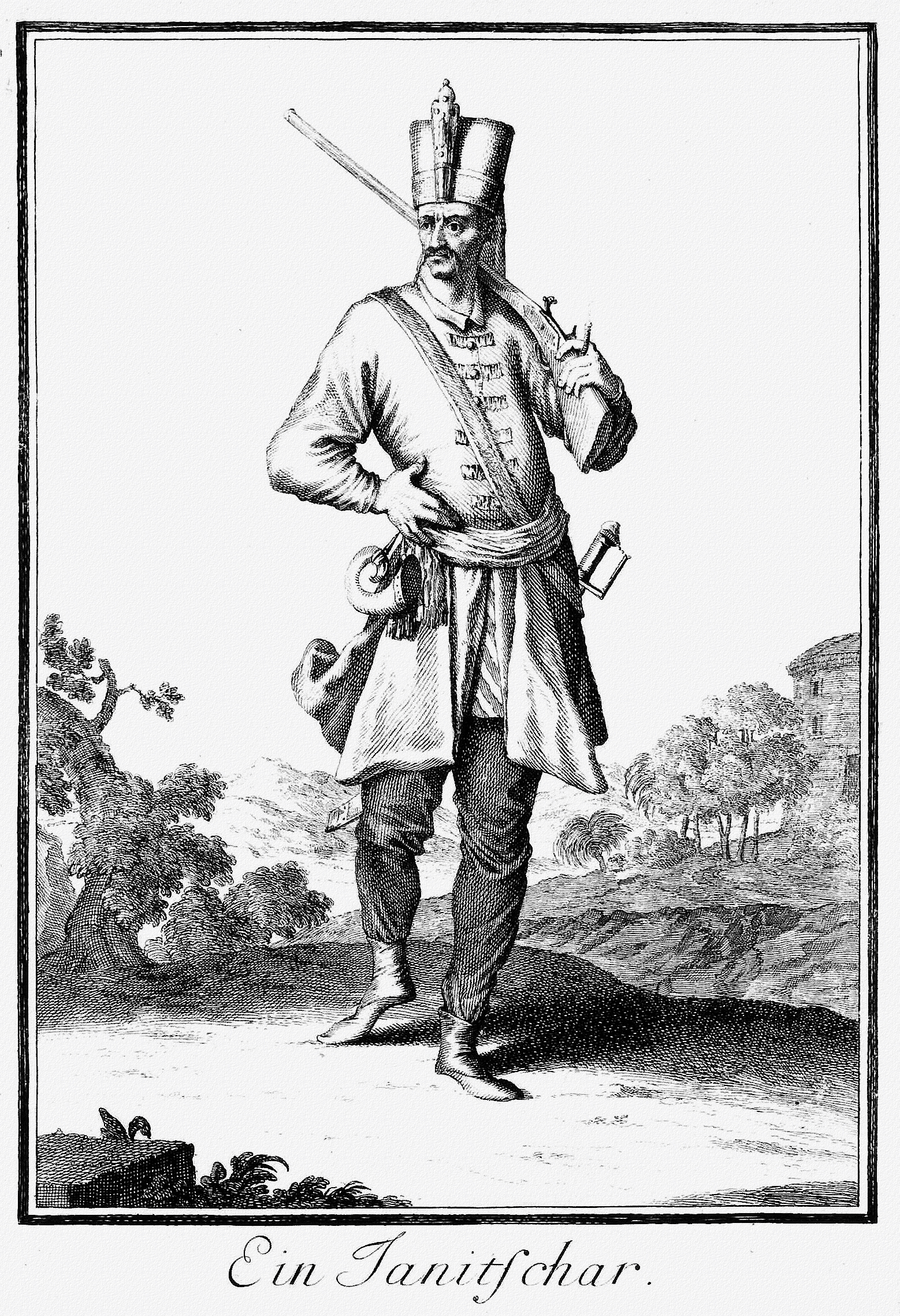 Neu-eröffnete Welt-Galleria. ..., Nürnberg 1703. 85. Ein Janitschar.